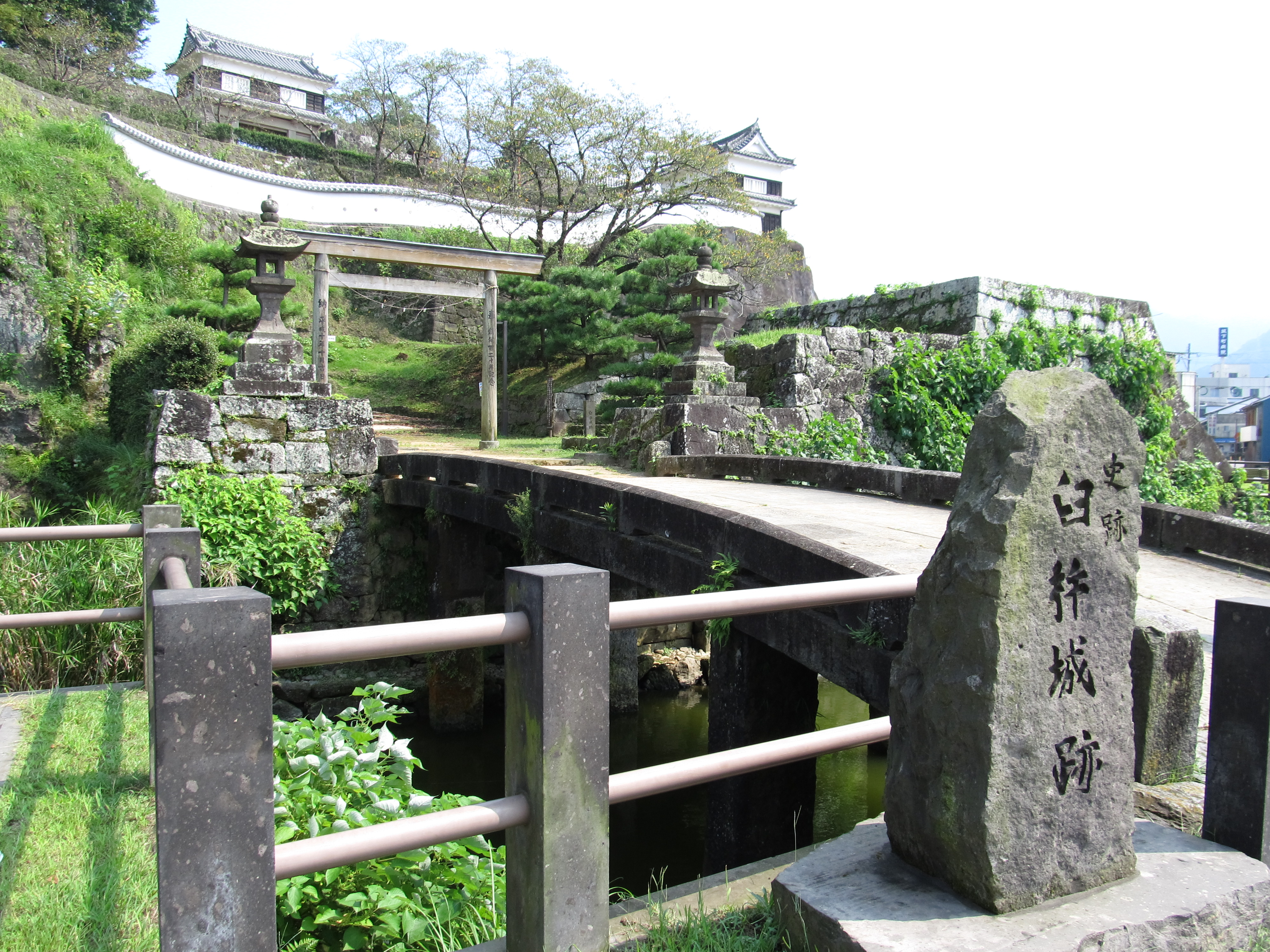 大分県臼杵市にある臼杵城跡（臼杵公園）の古橋口。